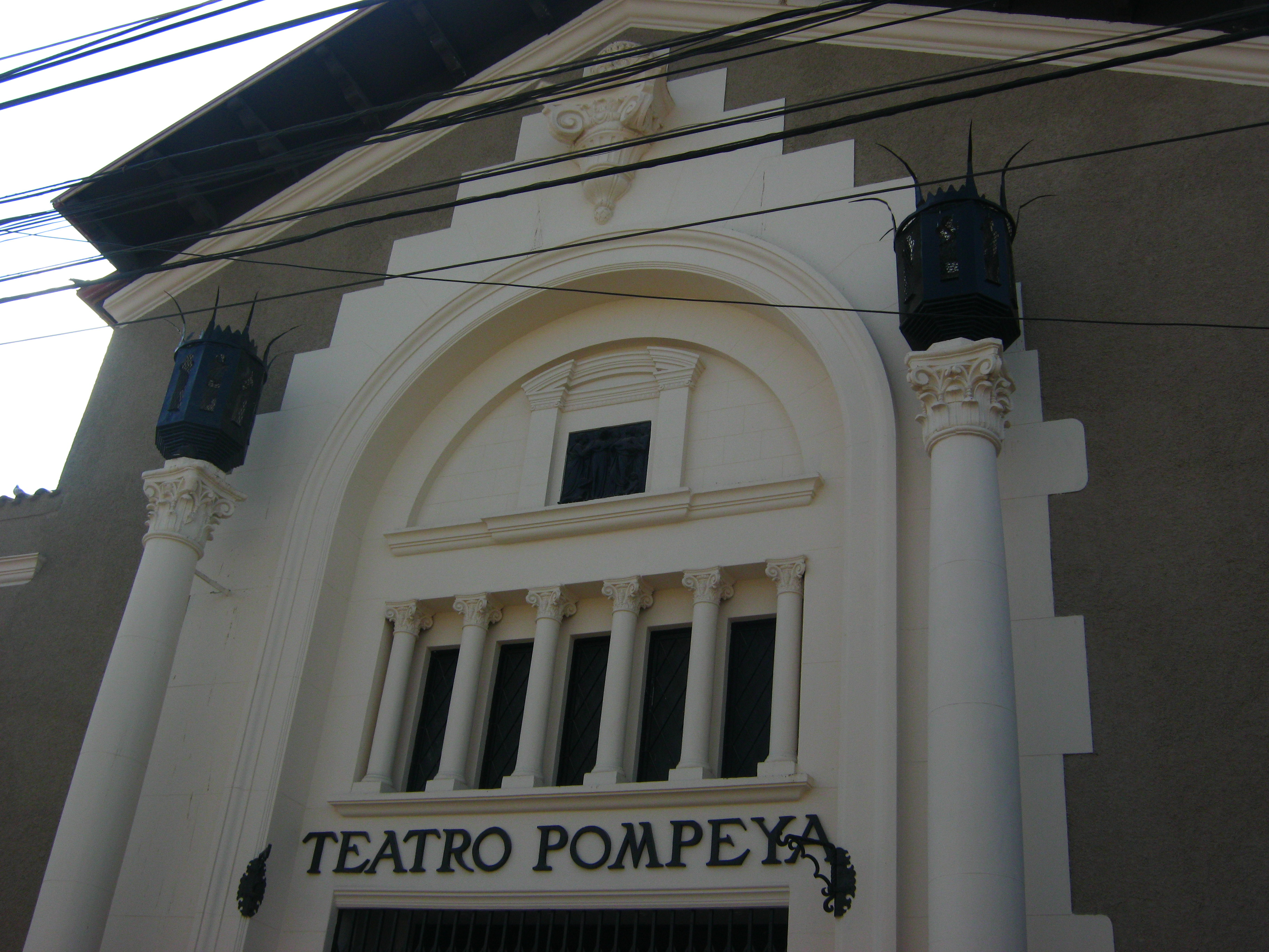 Teatro Pompeya y sus portales This is a photo of a national monument in Chile: 2081